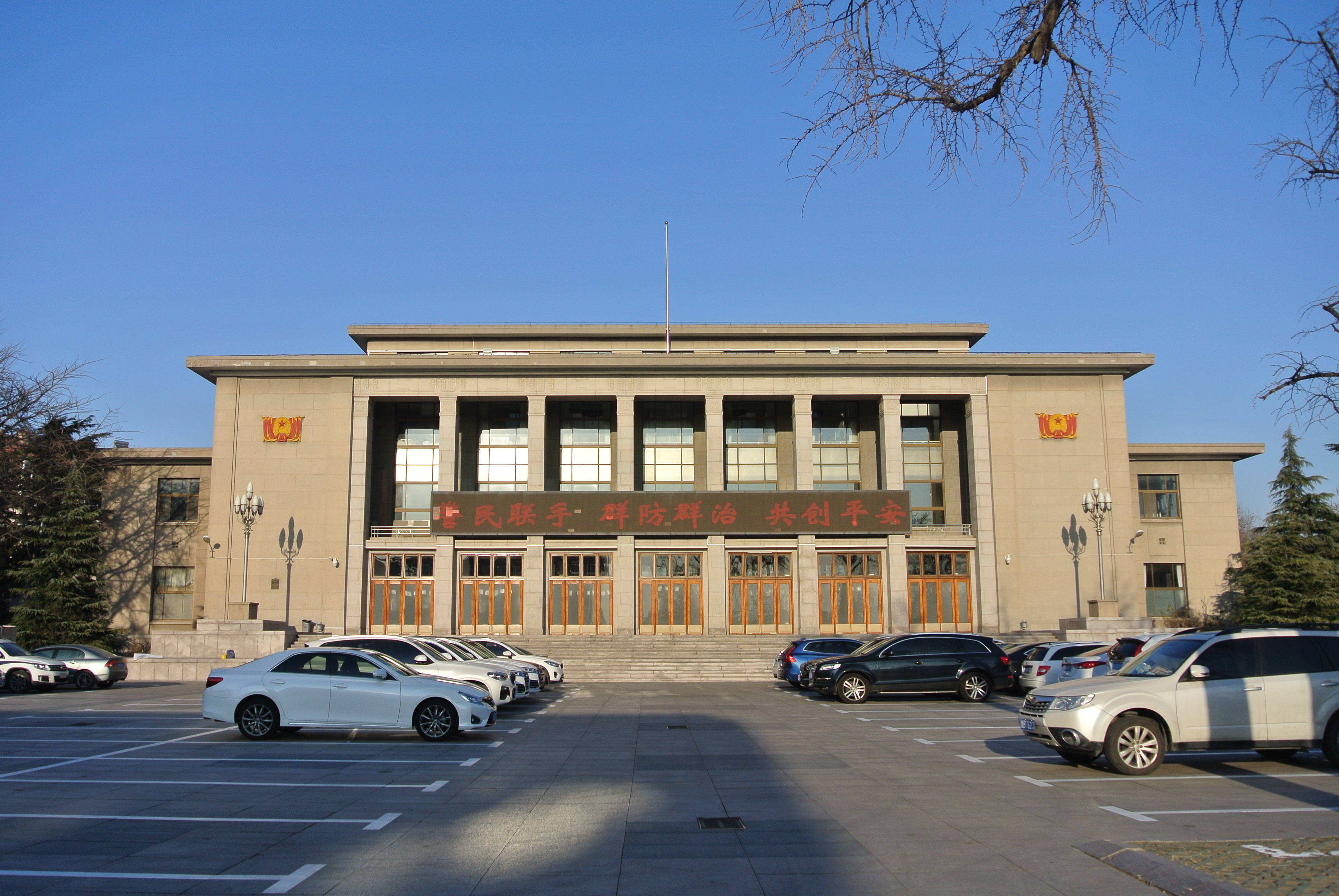 青岛市人民会堂